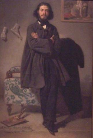 Santiago Rebull, óleo sobre lienzo, 50 x 40 cm, México, colección privada. Firmado "A MI AMIGO REBULL"